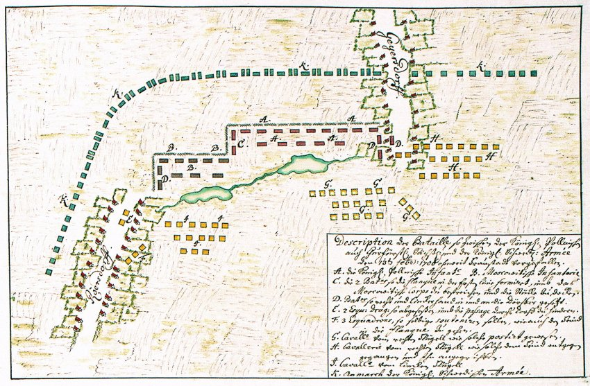 Description der Bataille so zwischen der Königl. Polnischen und Churfürstl. Sächsischen und der Königl. Schwed. Armee den 13. Februar 1706 ohnweit Fraustadt vorgefallen, Handzeichnung, koloriert, Schlachtordnung bei Fraustadt auf schematisch dargestellter Landschaft, 1706 mit Legende